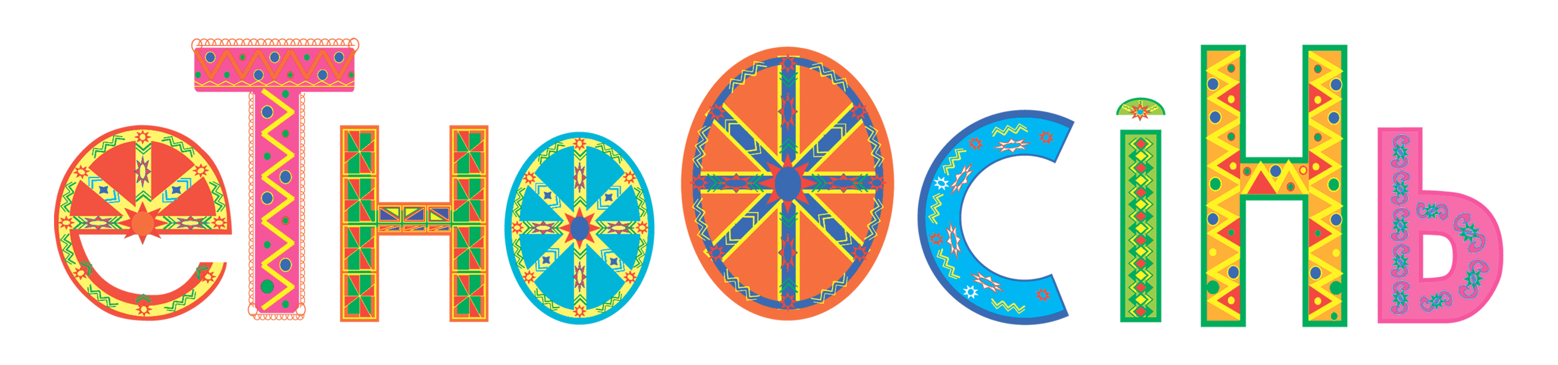 ЕтноОсінь Логотип